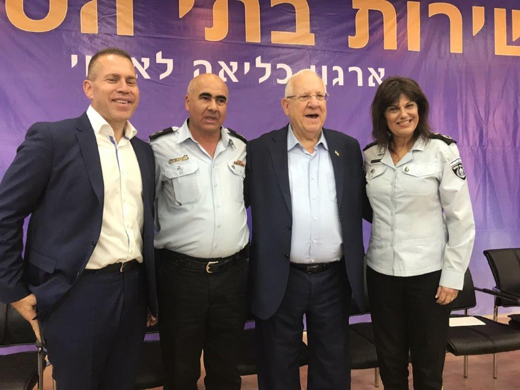 ביקור נשיא המדינה במחוז צפון בתאריך: 28.9.2017 בתמונה: הנשיא,השר לביטחון פנים,הנציבה ומפקד המחוז